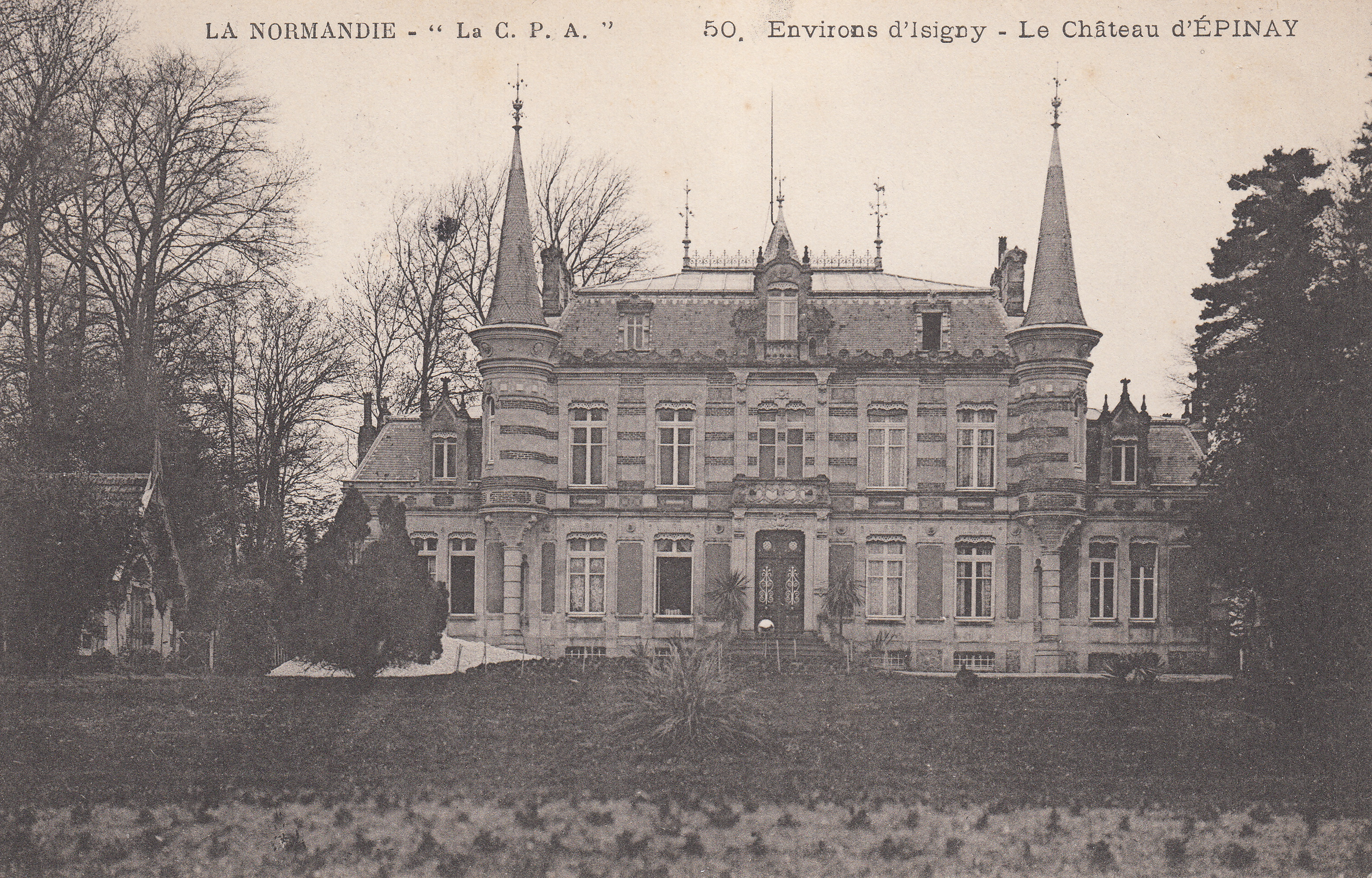 Château à Cartigny-l'Épinay, Calvados.